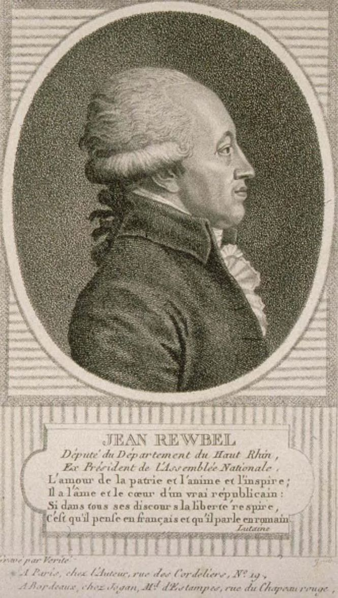 Jean-François Reubell, député du département du Haut-Rhin (estampe).